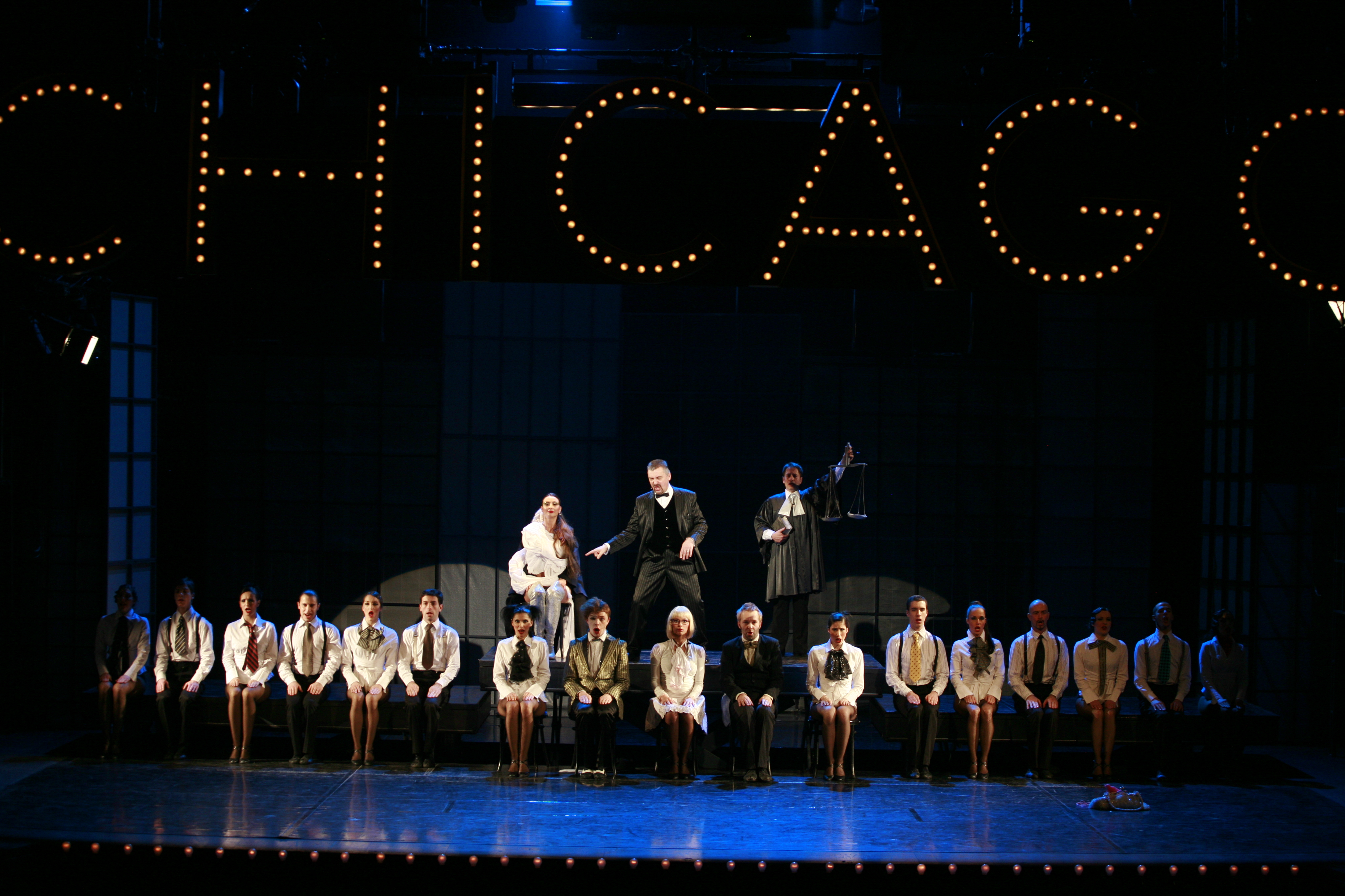 Stoto izvodjenje mjuzikla "Čikago"